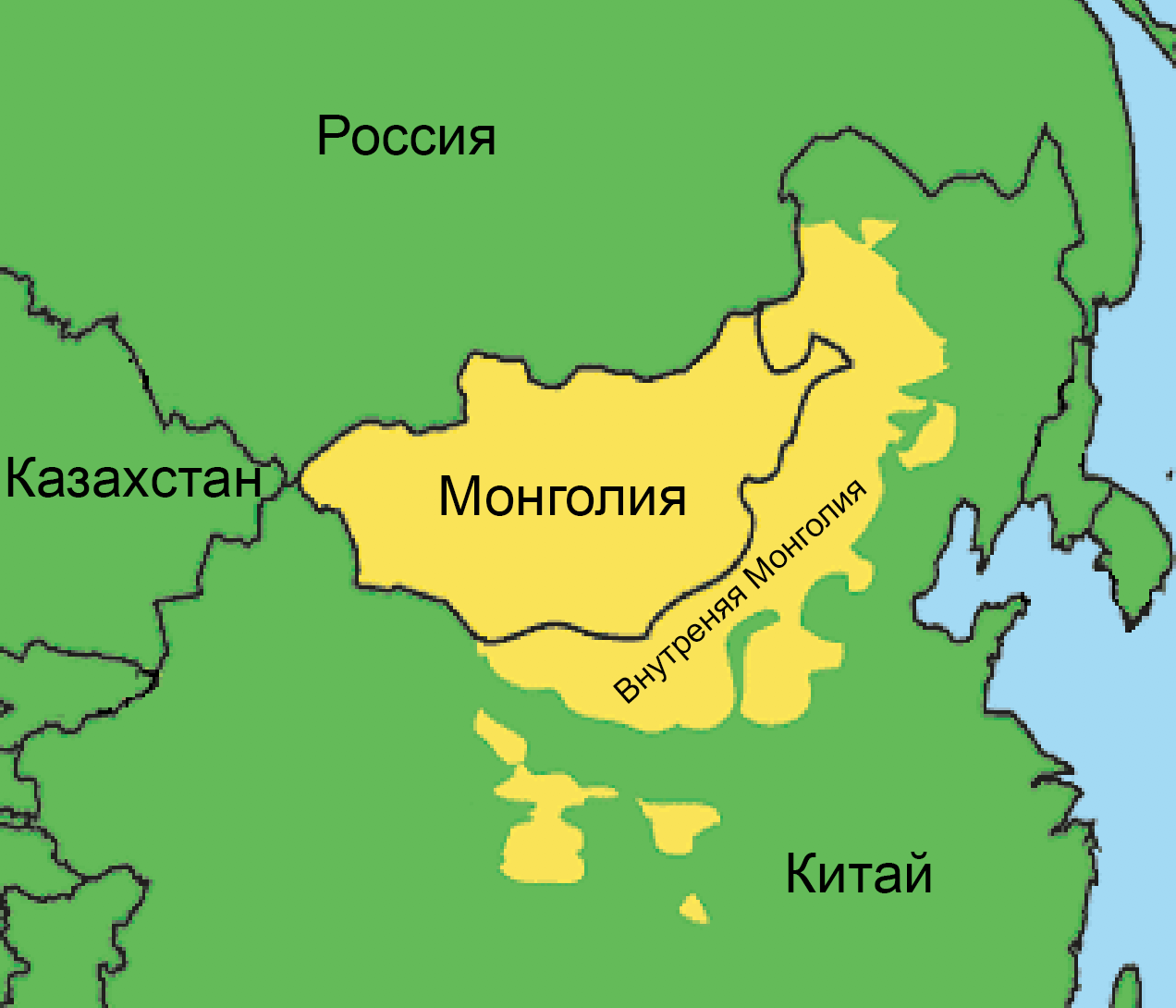 Карта распространения монгольского языка (Русский)